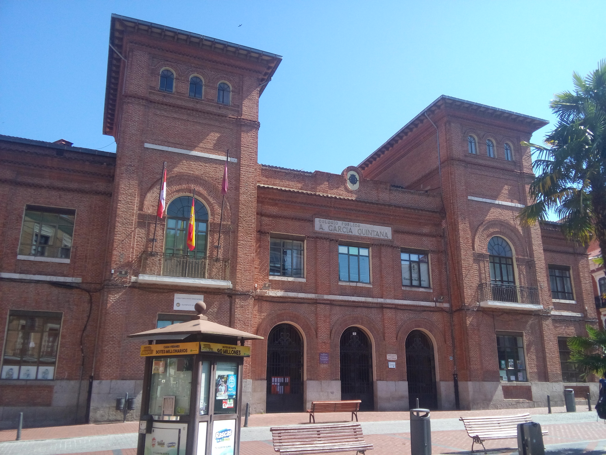 CEIP Antonio García Quintana (1930)